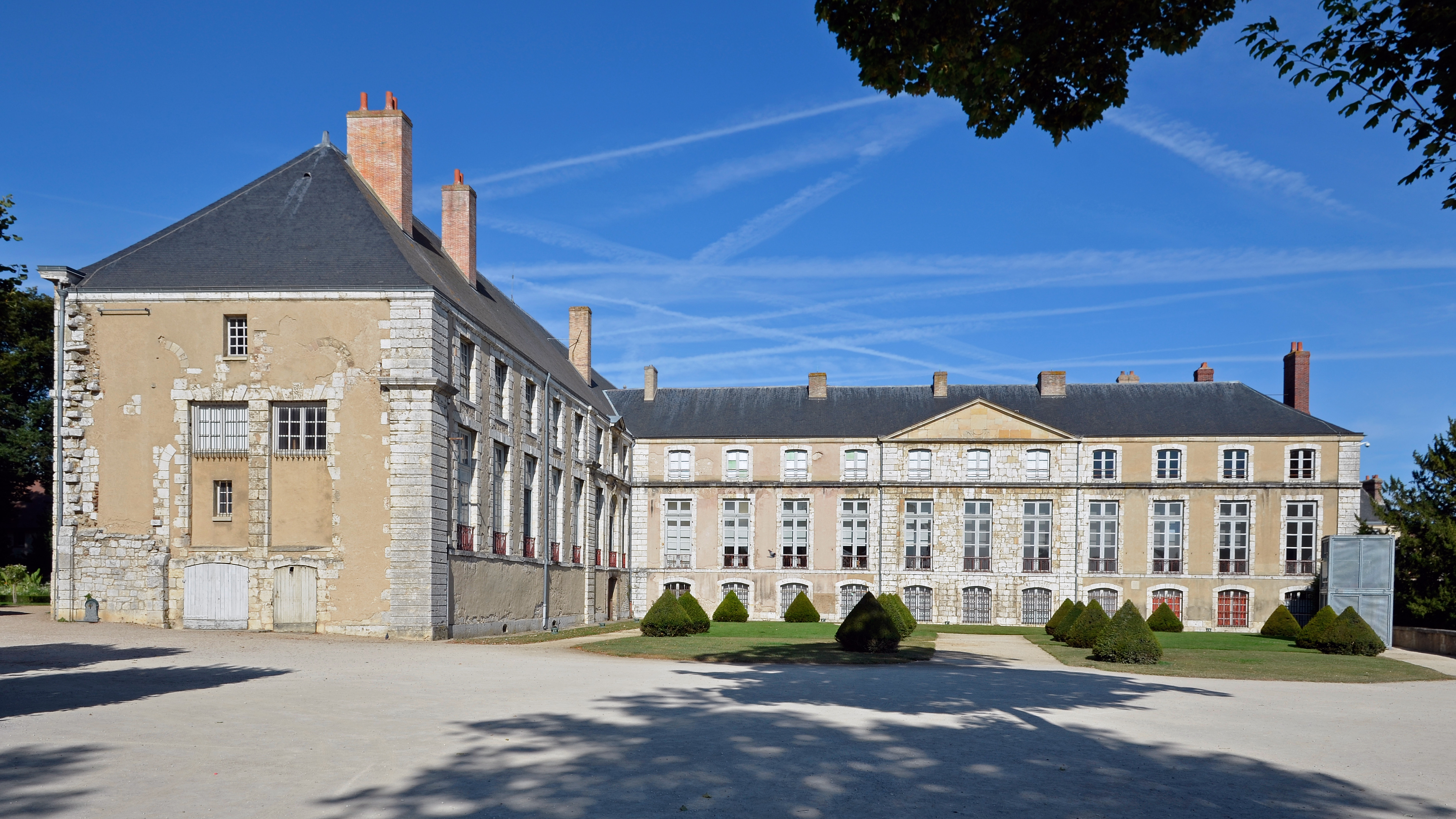 Façade côté jardin du Palais épiscopal, actuel musée des Beaux-Arts - Chartres. Construction : 13e siècle; 17e siècle; 18e siècle. .